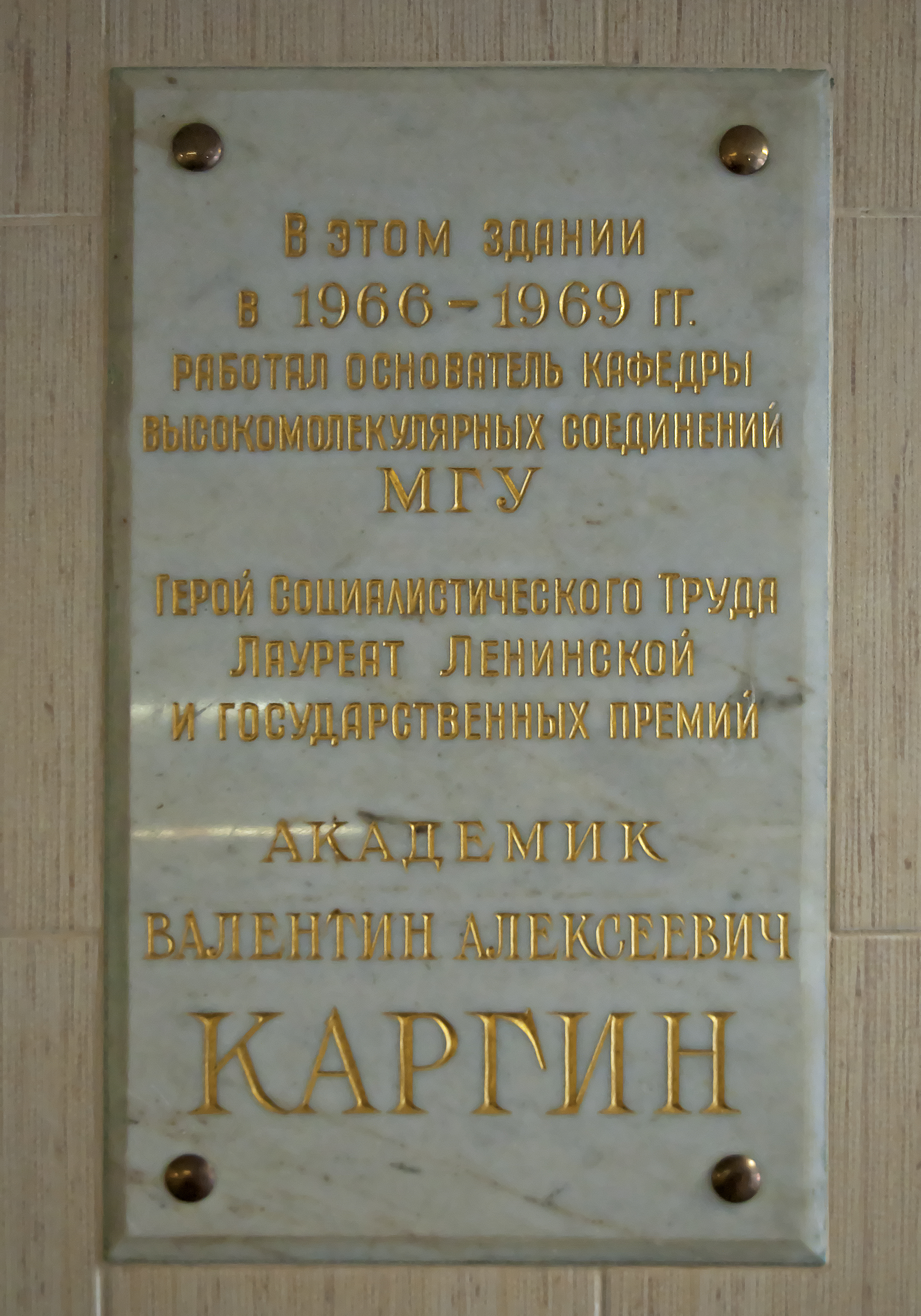 Мемориальная доска в память академика Валентина Алексеевича Каргина, установленная в Лабораторном корпусе "А" Московского университета.